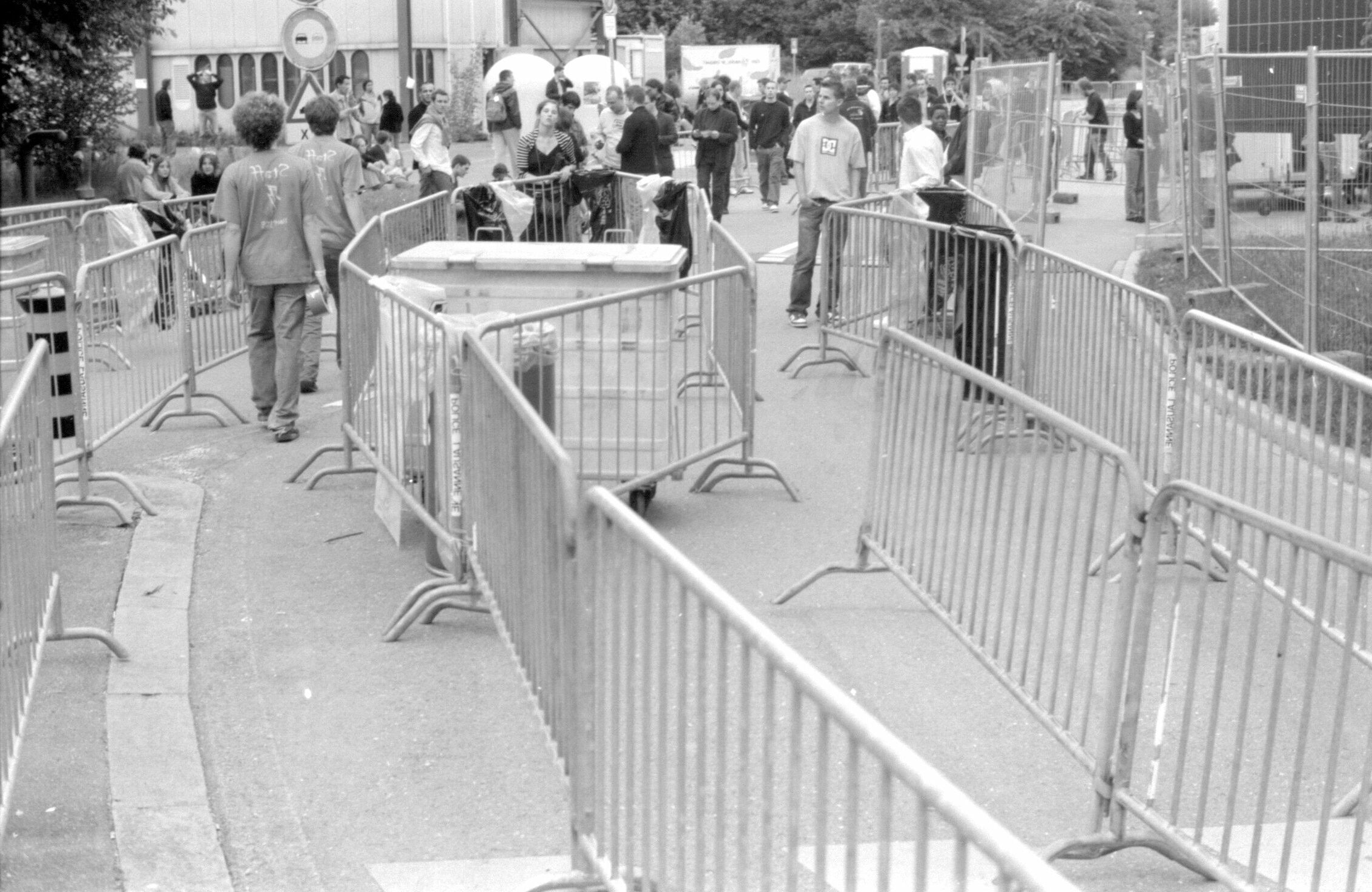 Grilles-Balelec